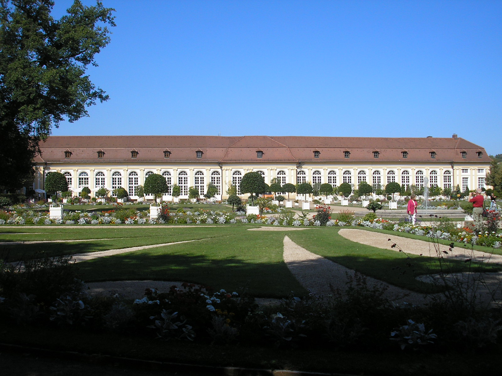 Die Orangerie im Schlossgarten in Ansbach (Mittelfranken).